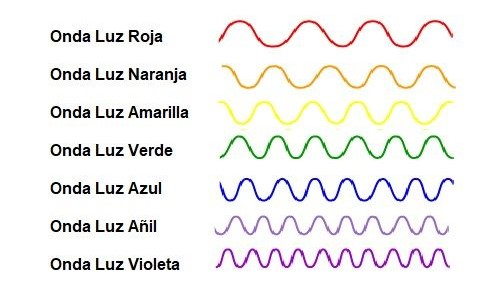 Koloreen uhin luzerak.